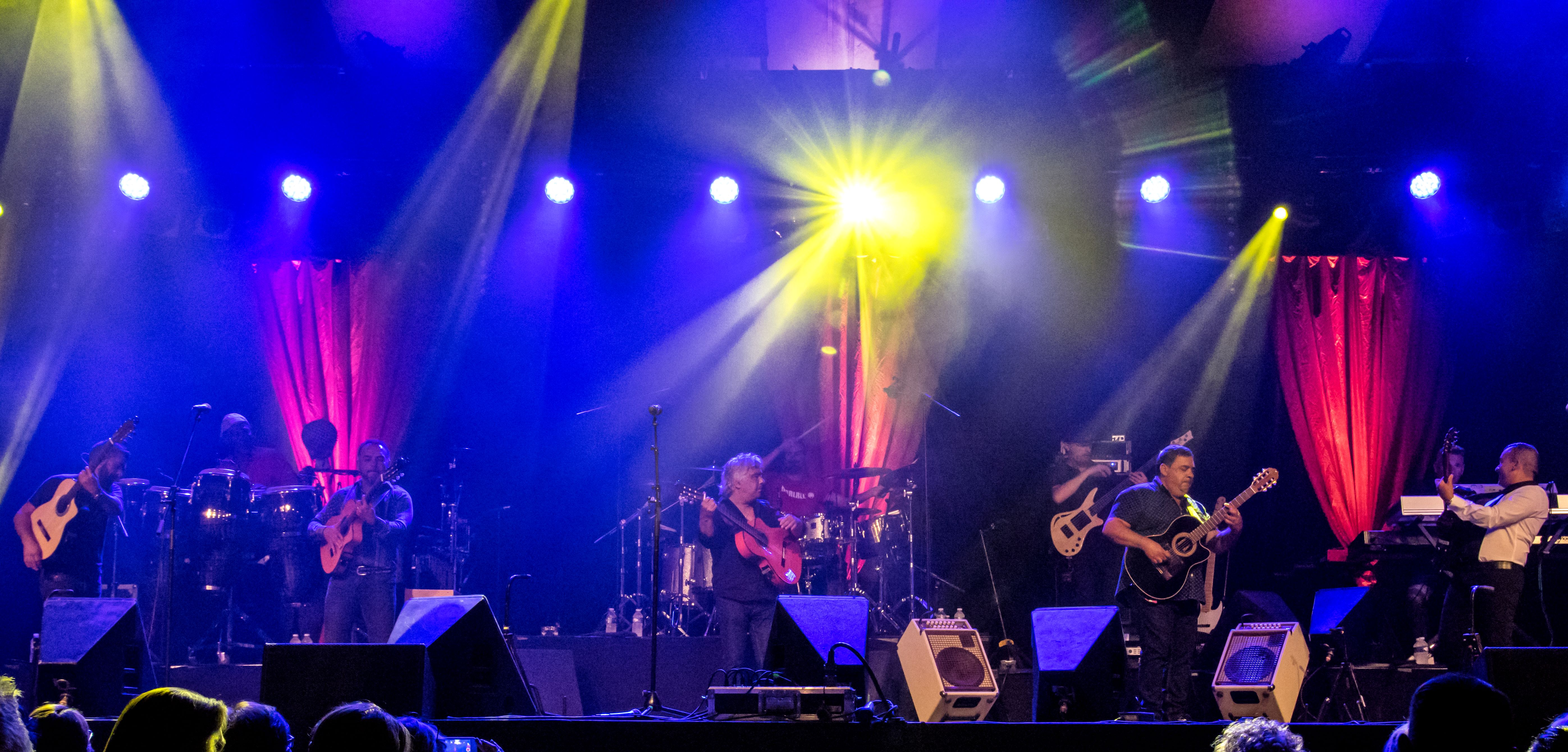 Bilder vom Zelt Musik Festival 2016 in Freiburg im Breisgau Gipsy Kings